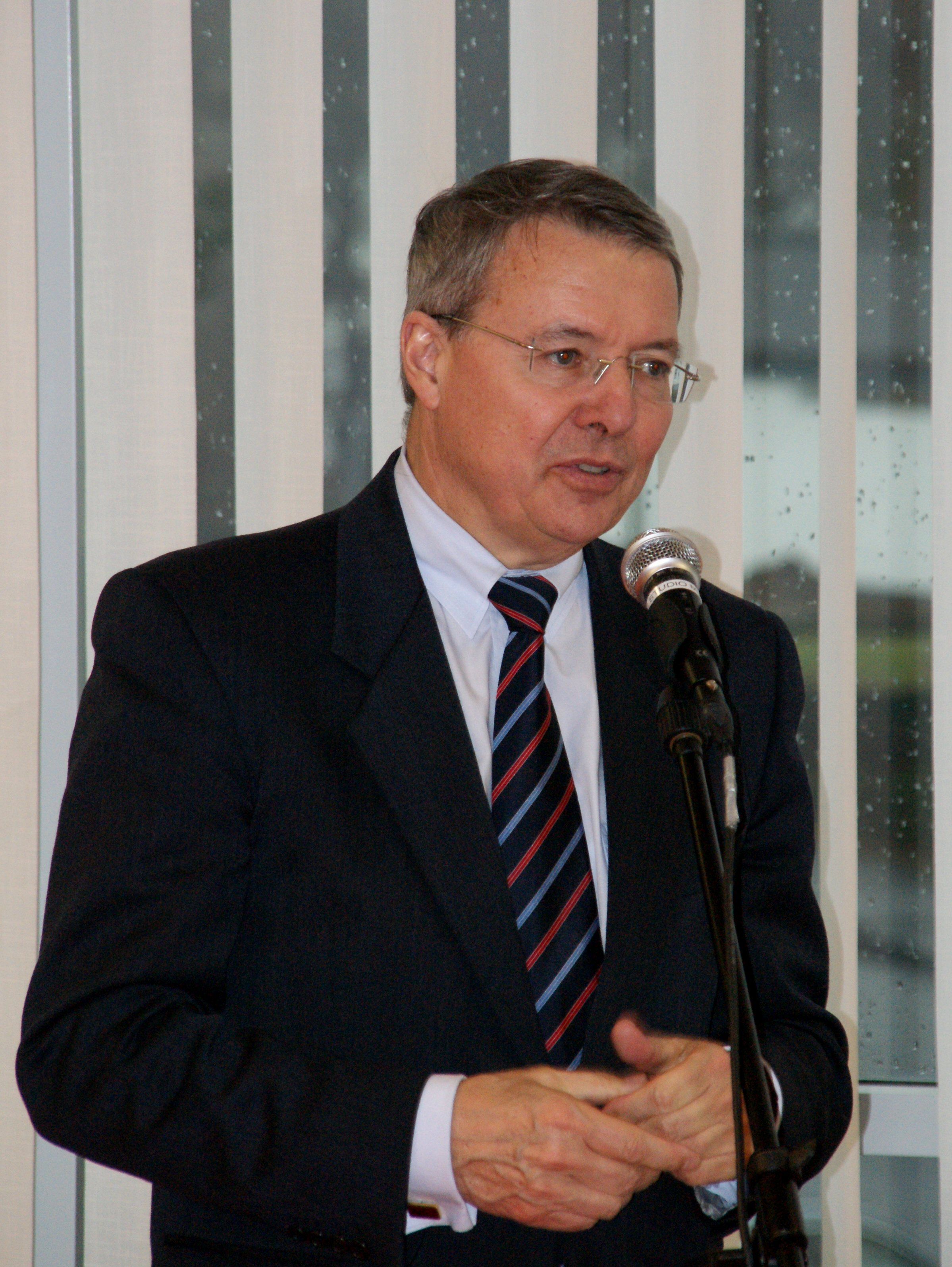 Frithjof Kühn, visit at the CJD Christophorusschule Königswinter